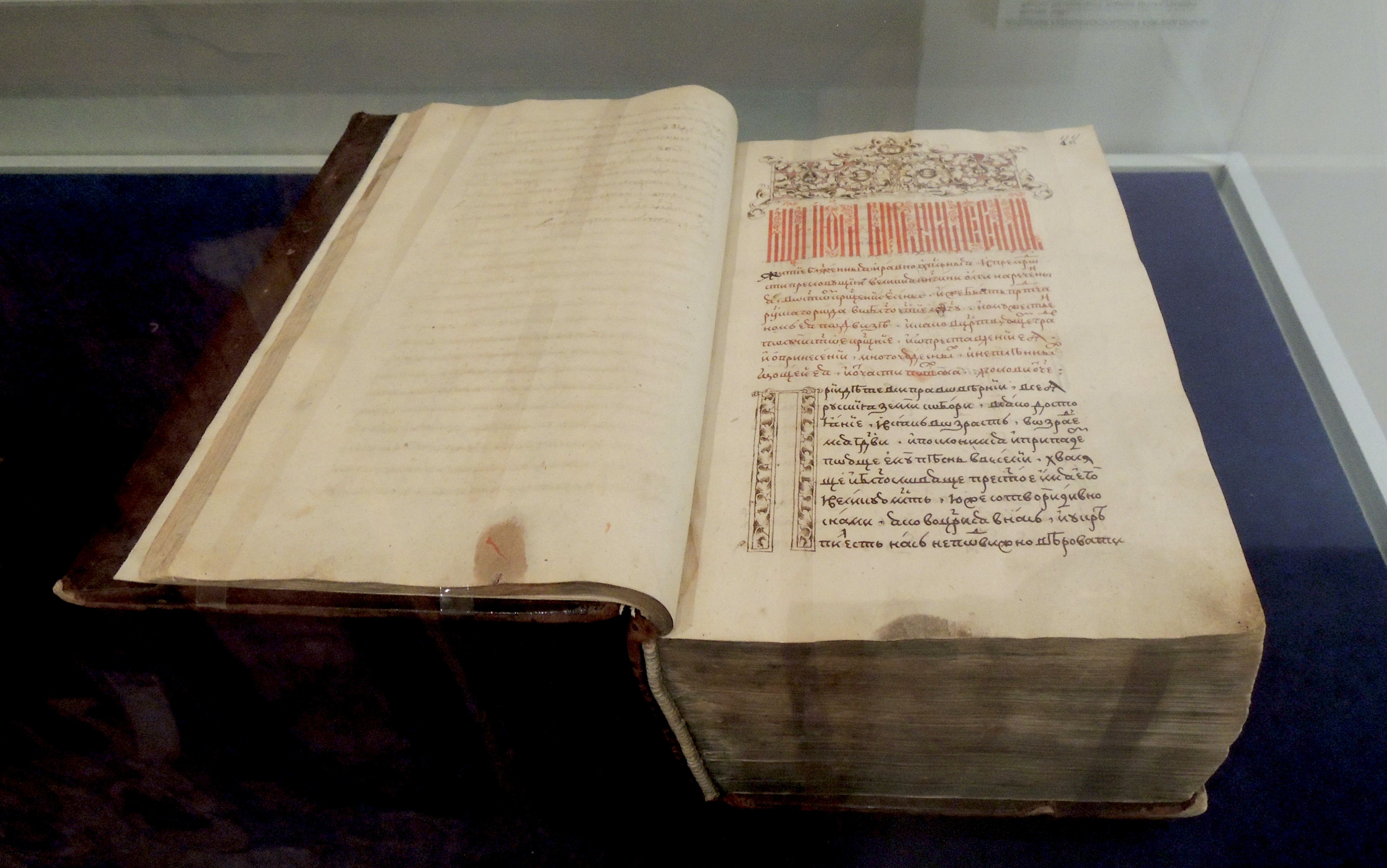 Житие княгини Ольги (в Степенной книге Пространной редакции, с дополнениями). Москва (?), сер. 17 века. Рукопись: бумага, чернила, киноварь, книжная скоропись, заставки старопечатного стиля, инициалы, вязл. Переплет третьей четверти 18 века.: картон, кожа с золотным тиснением; на корешке вытеснено: "Книга Степенная". Содержит повествование "о прихождении в Царьград блаженныя Ольги и крещении ея". ГИМ